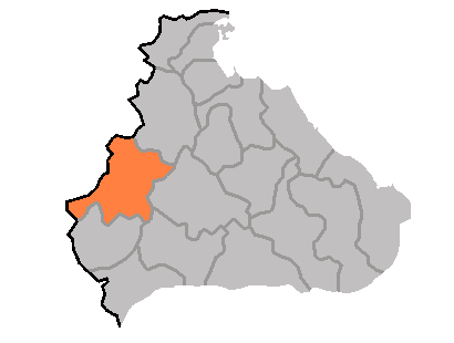 Pangyo county map